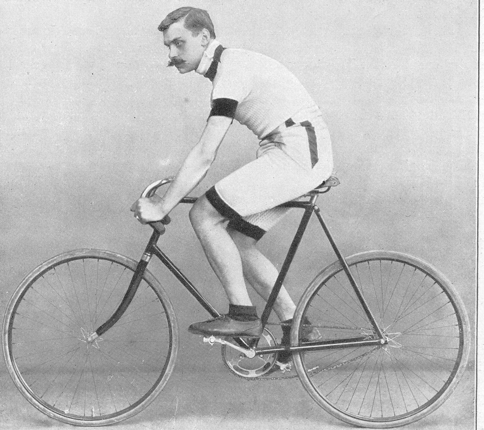 Jack William Stocks, britischer Radrennfahrer